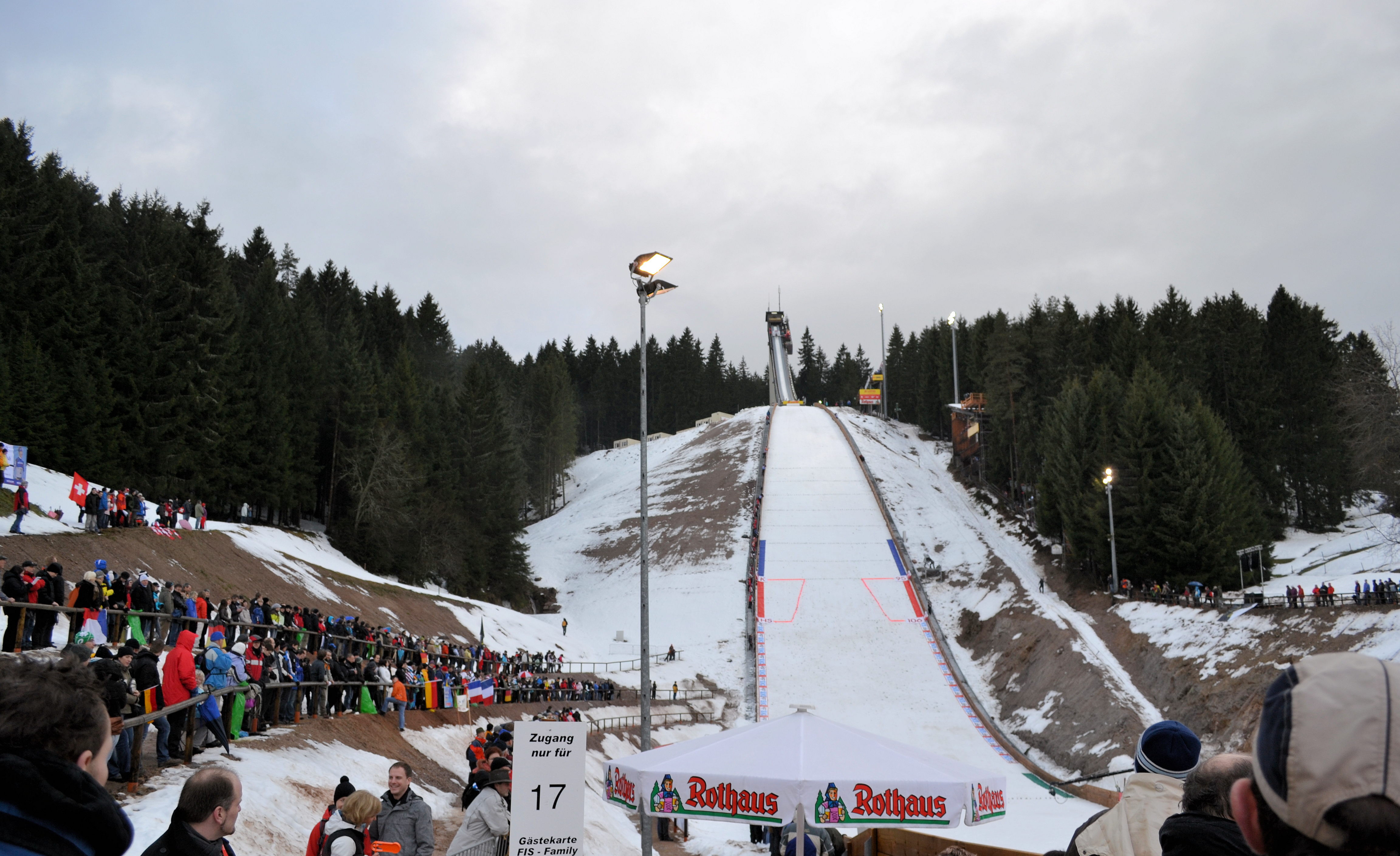 Die Langenwaldschanze während des Schwarzwaldpokals 2011